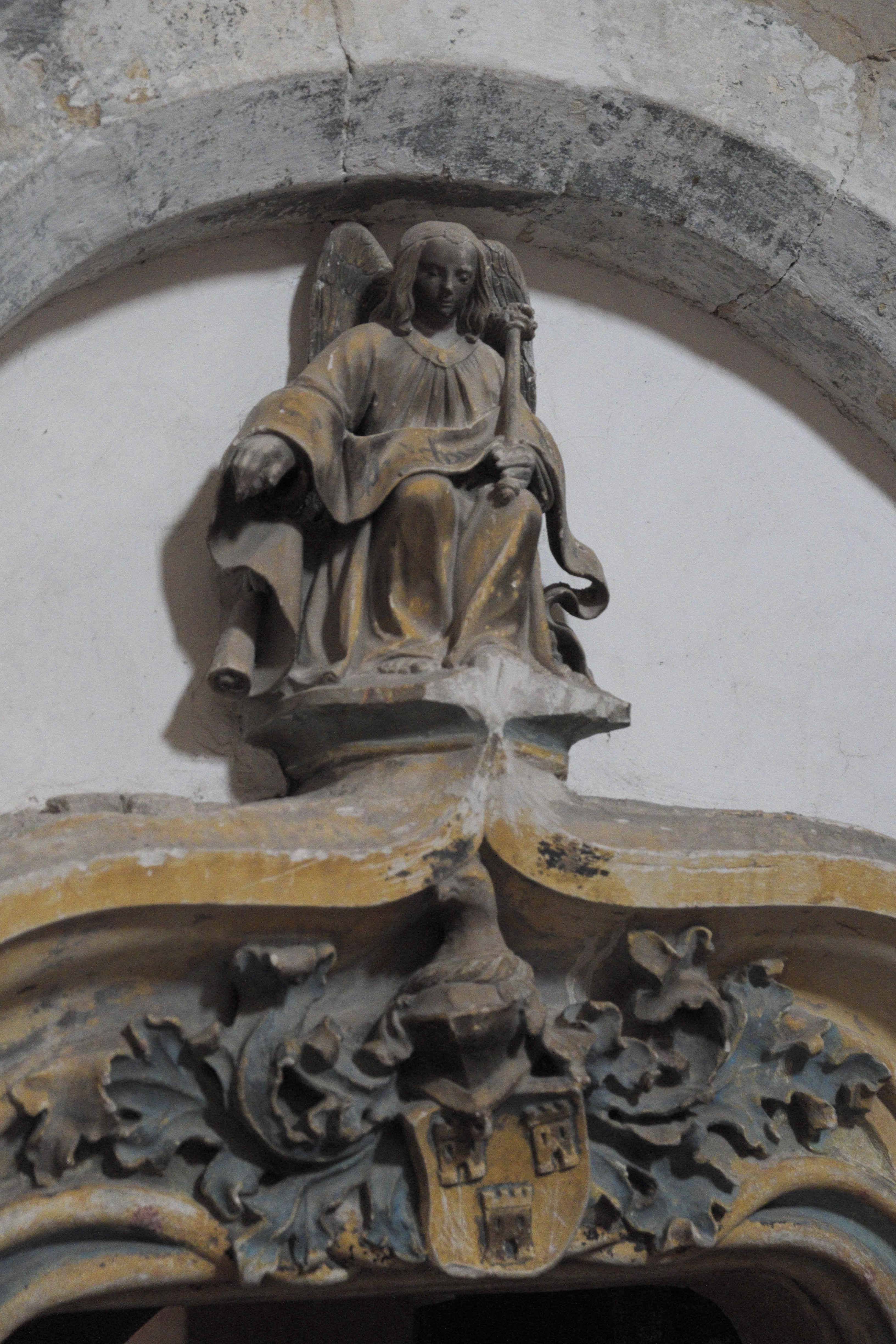 Armoiries de la Maison de Monstier au linteau de la porte d'entrée de la chapelle du Saint-Sépulchre en l'église Saint-Jean-Baptiste de Chaource (10).